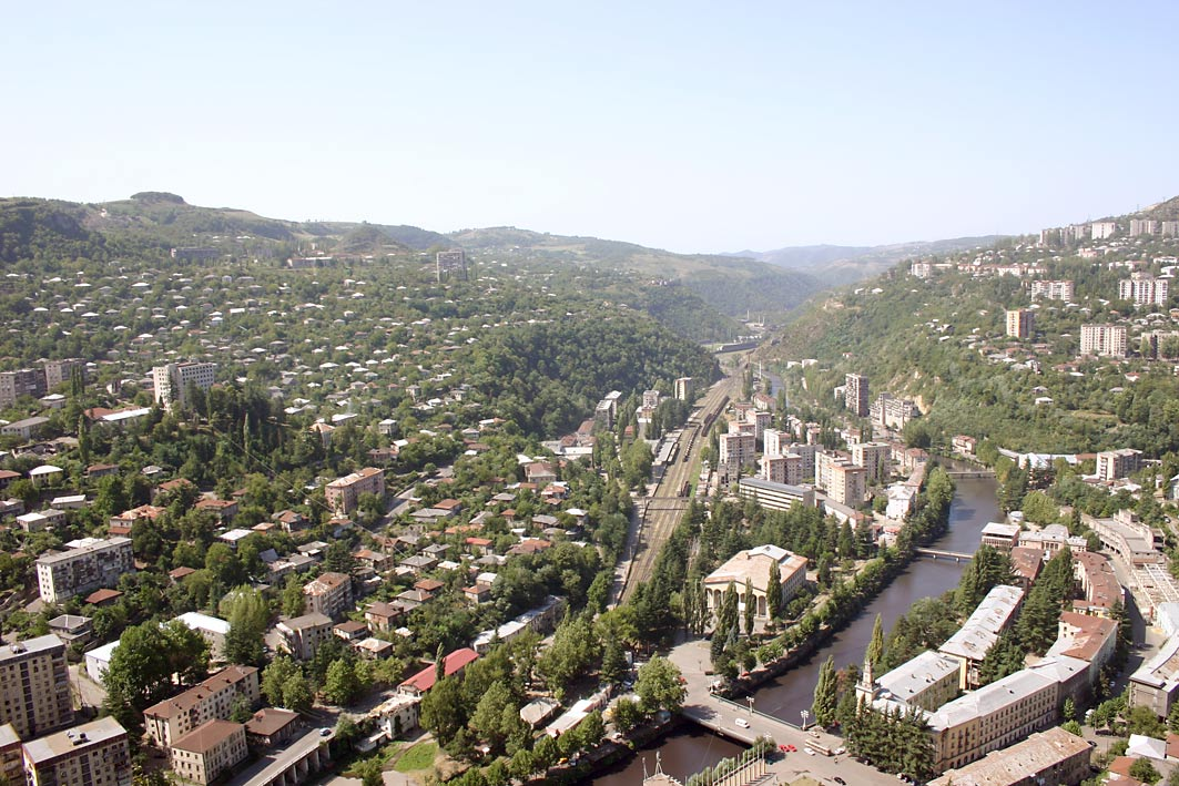 Tschiatura (ჭიათურა) - Blick in südwestliche Richtung